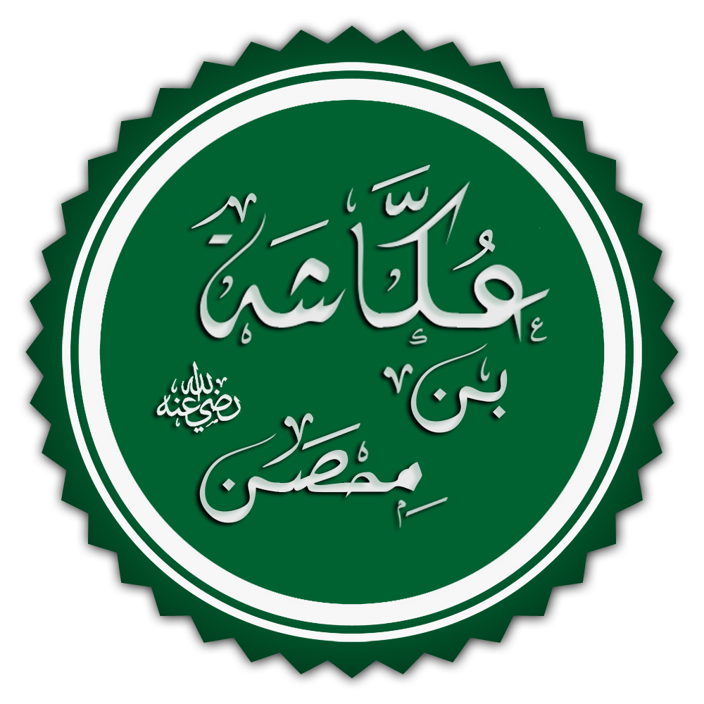 تخطيط اسم الصحابي عكاشة بن محصن ملحوق بدعاء الترضي عنه